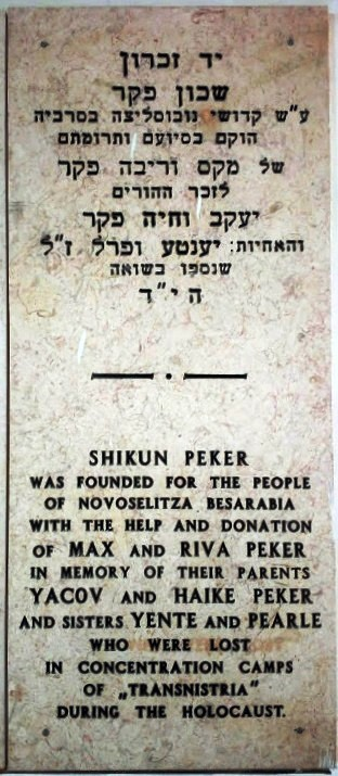 שלט שיכון פקר הנמצא על קיר בבית הכנסת "יד ושם לזכר קדושי נובוסליצה" ברמת השרון